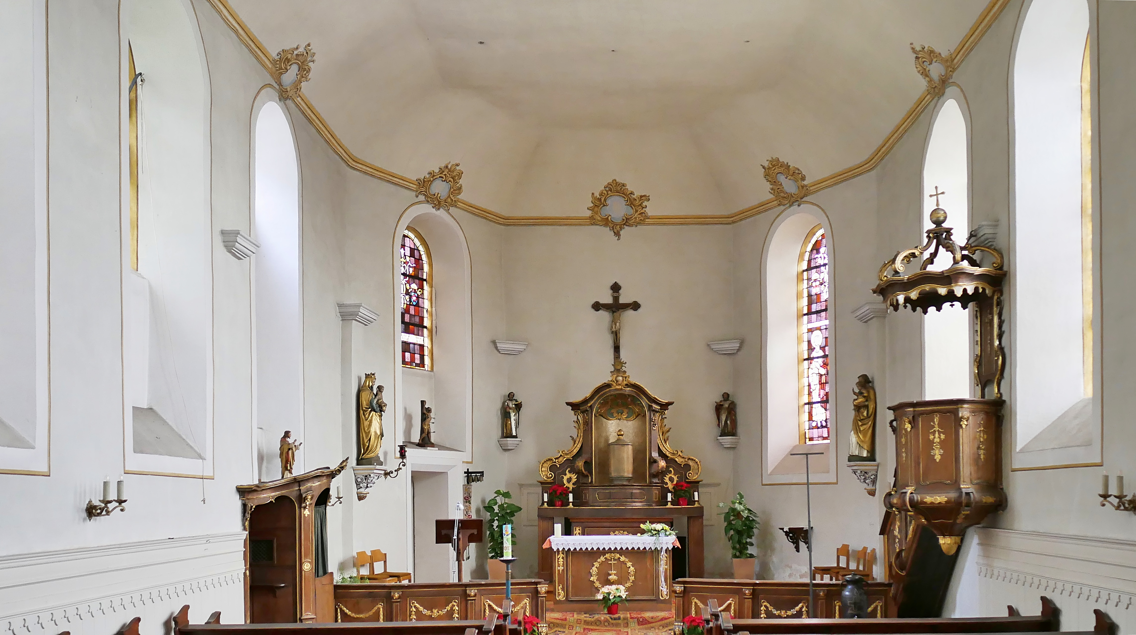 St. Simeon und Juda (Trier-Pallien), Innenraum, Kanzel und Altar